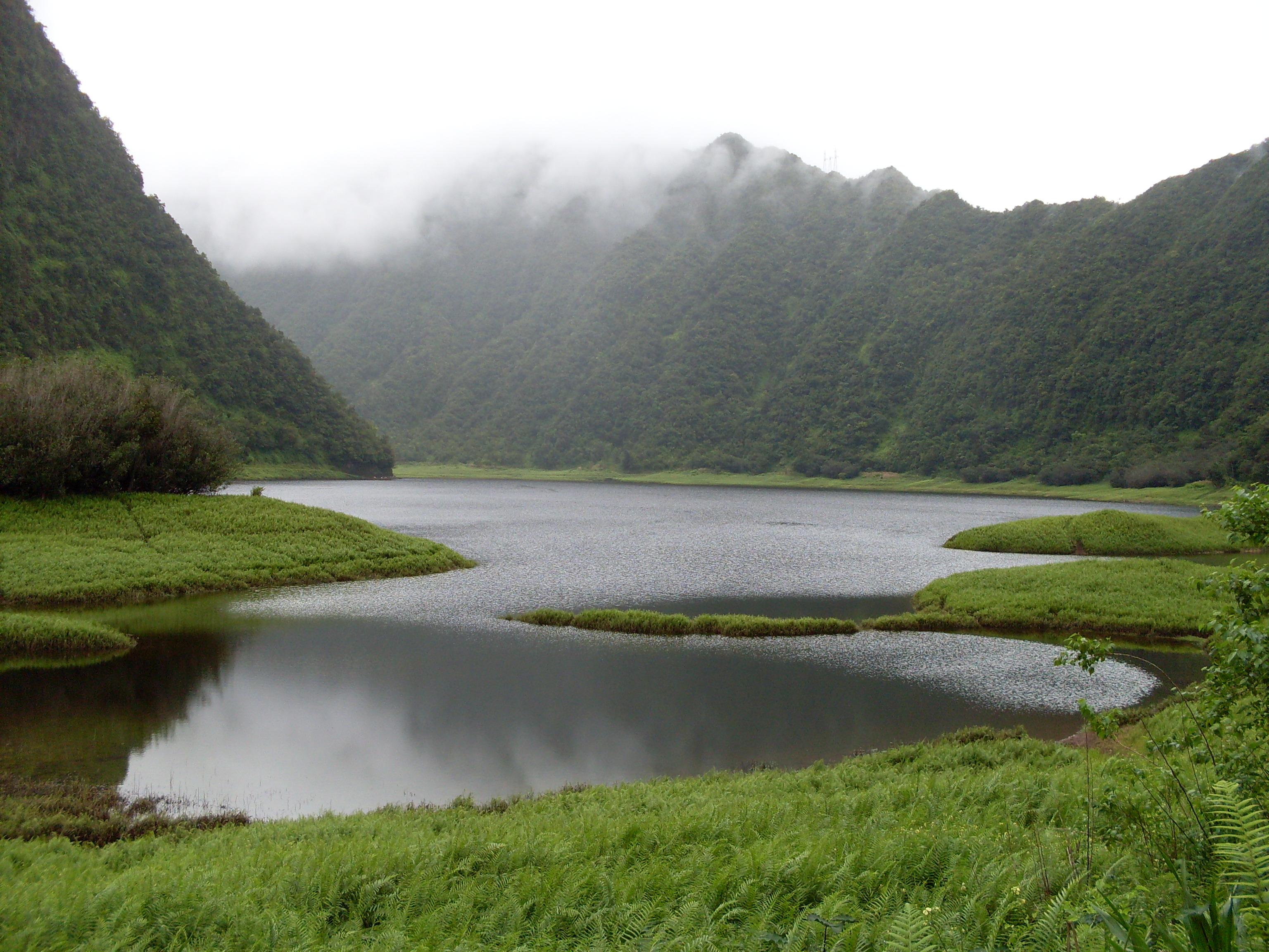 Grand Étang - Ile de la Réunion